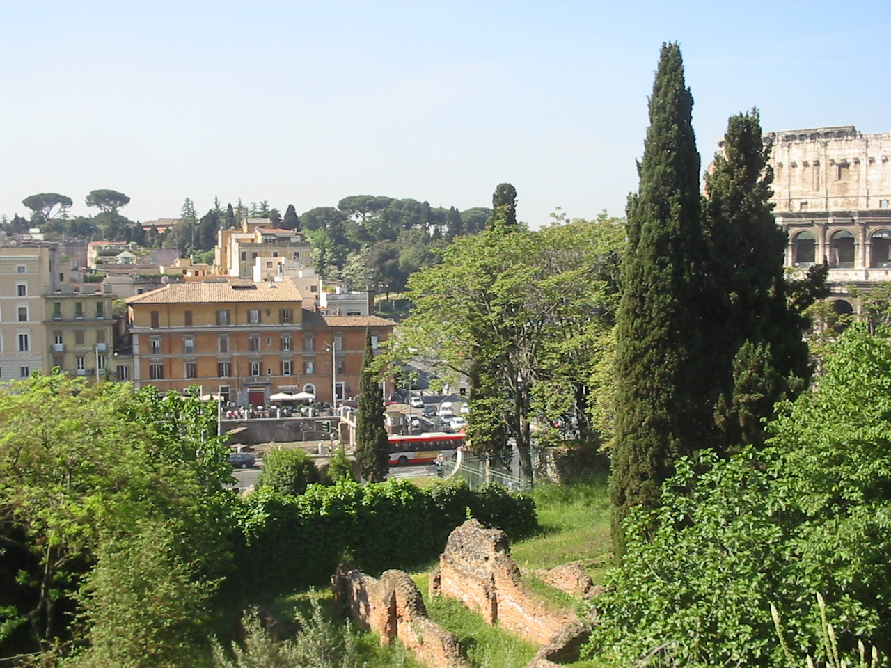 Colosseum, Roma